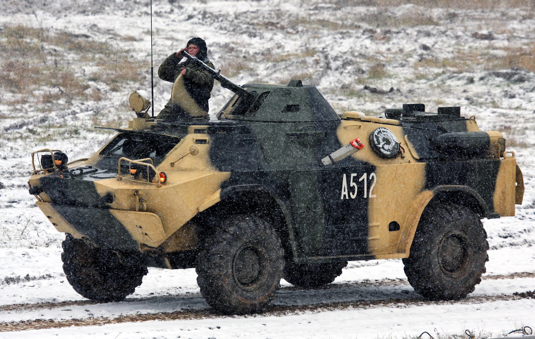 БРДМ-2М (BRDM-2M)